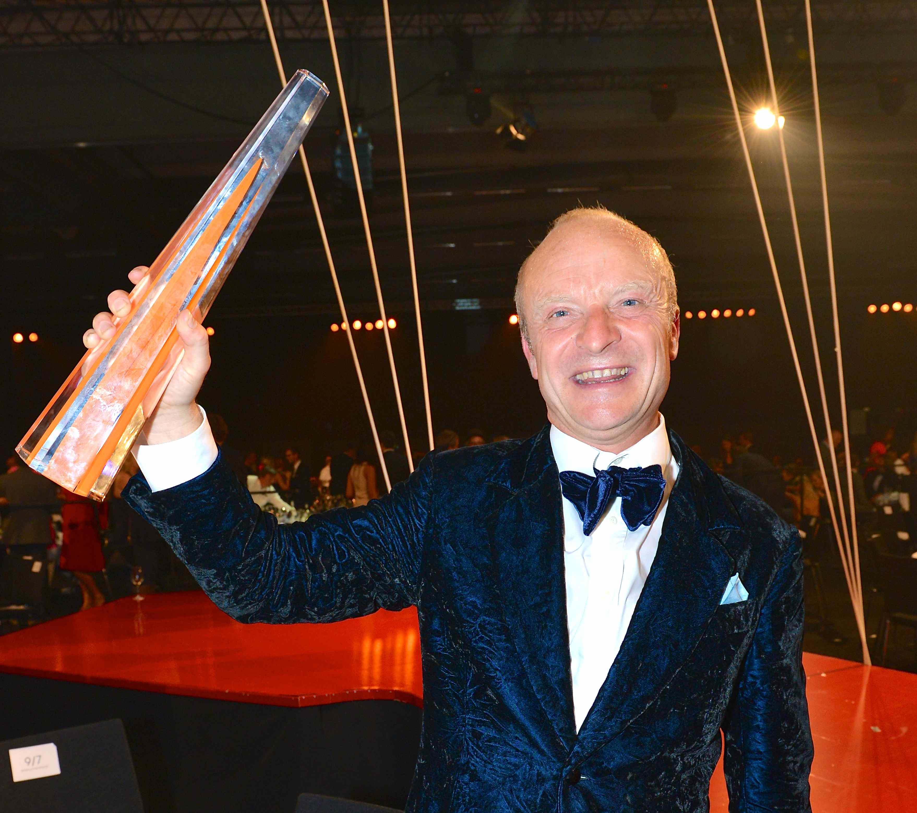 Jonas Gardell blev en av vinnarna av Kristallen för Årets tv-drama "Torka aldrig tårar utan handskar" på Kristallengalan den 30 augusti 2013.